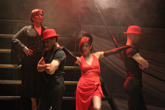 Claudia La Valle interpretando anything goes junto a Luis Lopez Morera, Carlos Silveyra y Magdalena Zapiola